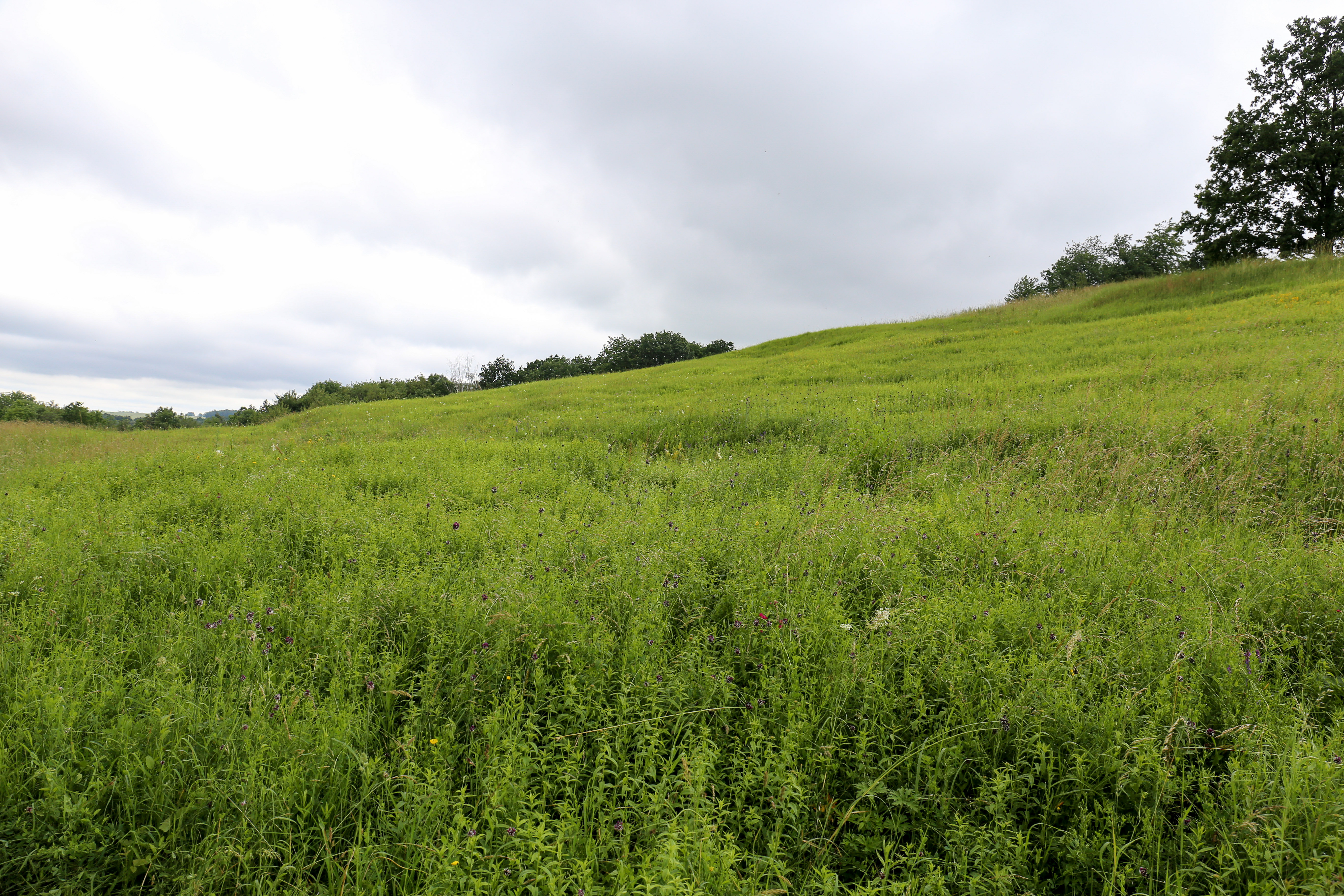 Rezerwat przyrody „Góra Gipsowa” – stepowy rezerwat przyrody na południowym stoku Góry Gipsowej (285 m n.p.m.[3]), w pobliżu miasta Kietrz na terenie Płaskowyżu Głubczyckiego.